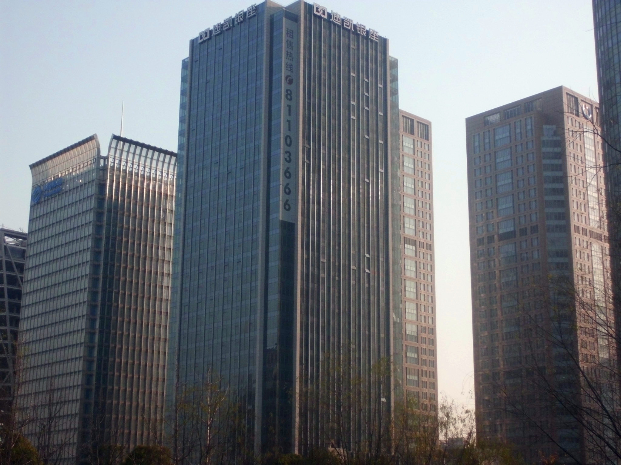 迪凯国际中心